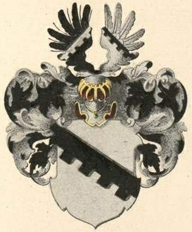 Grotthussi suguvõsa aadli- ja parunivapp